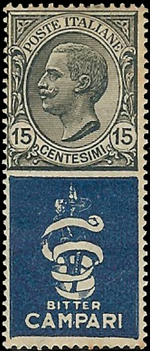 Почтовая марка Италии 1918 года с рекламным купоном